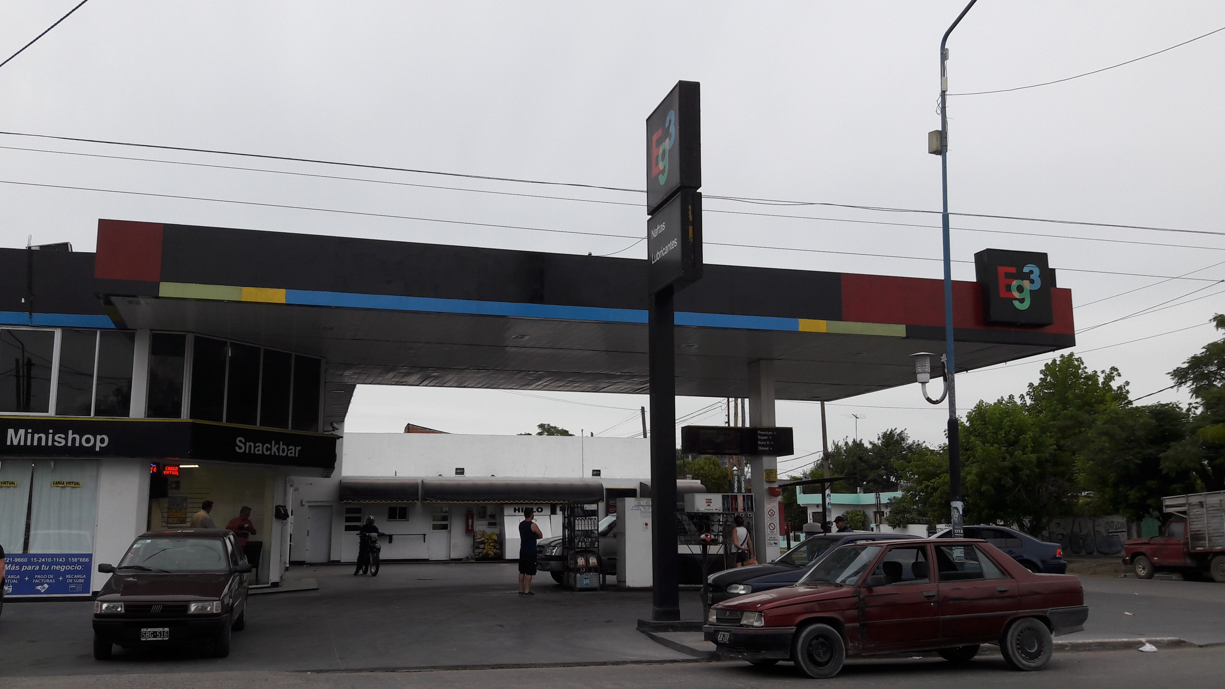 Fotografía de una Eg3, Guernica